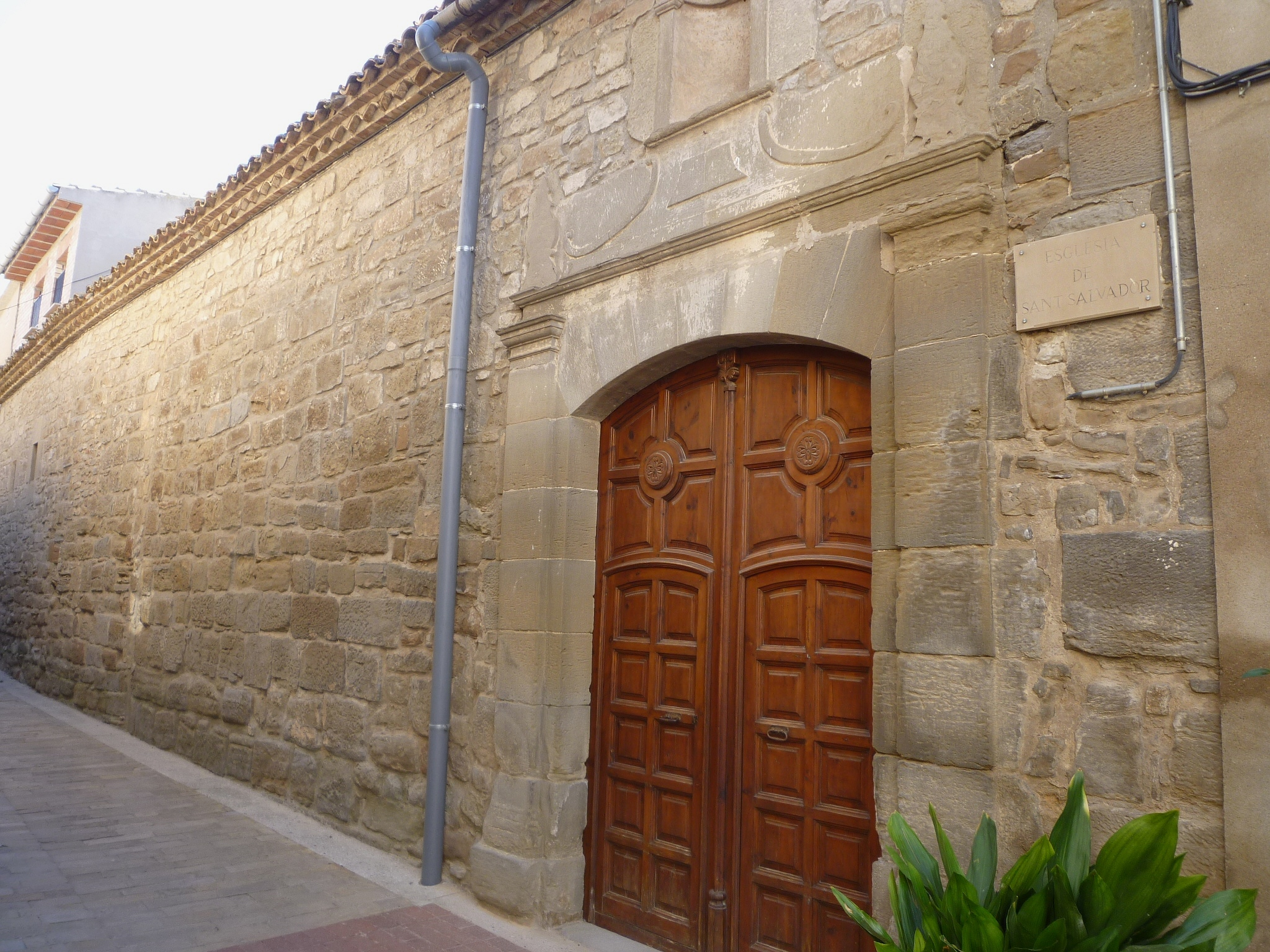 Església parroquial de Sant Salvador (Massoteres): porta d'entrada